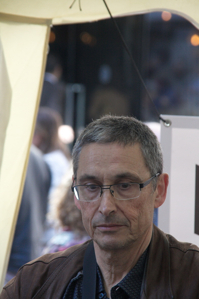 Signatura de llibres en la Diada de Sant Jordi-2015 a Barcelona